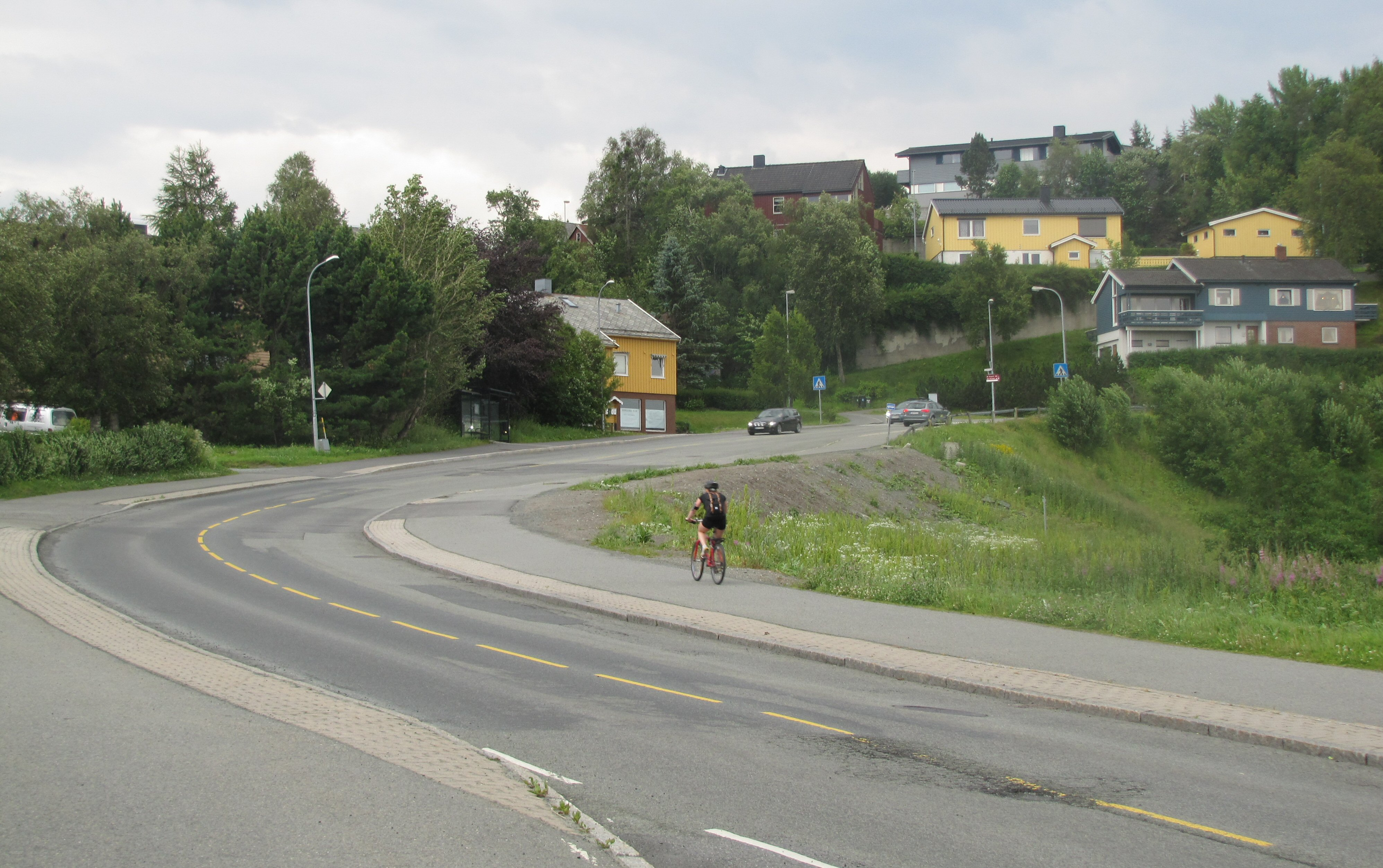 Steinanvegen (FV862), Trondheim